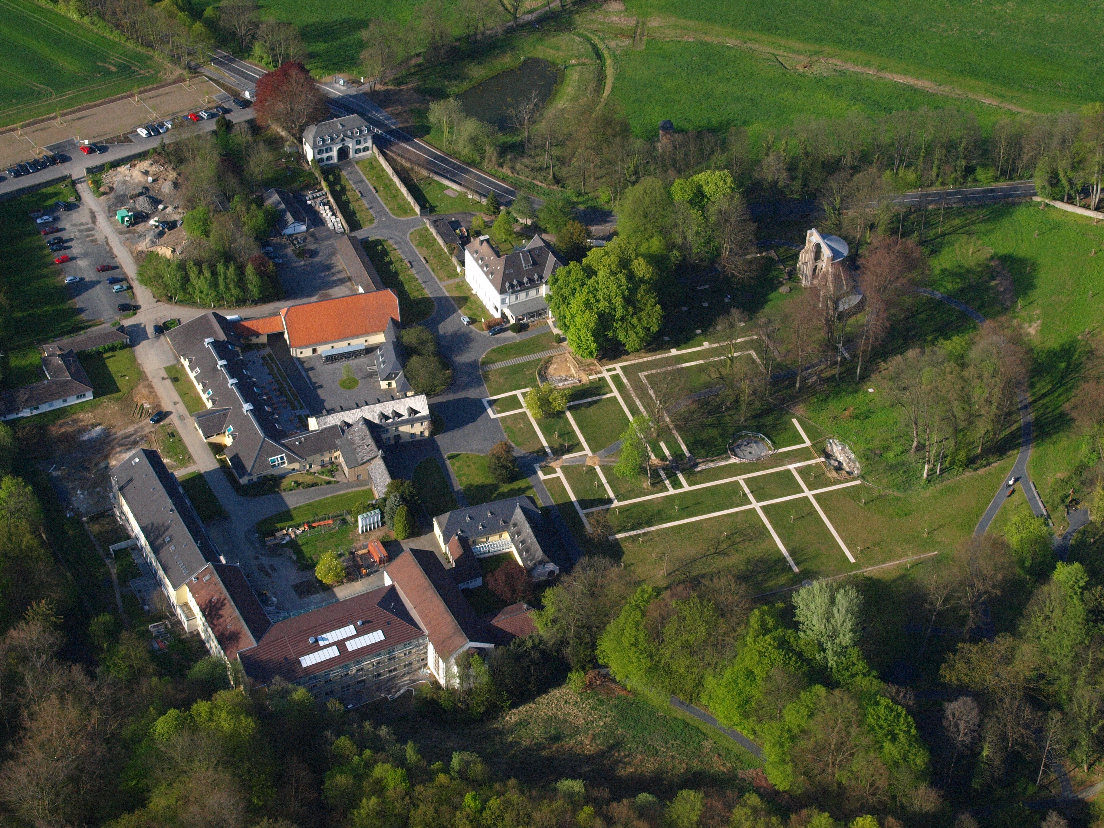 Gesamtansicht der Klosteranlage des ehemaligen Klosters Heisterbach